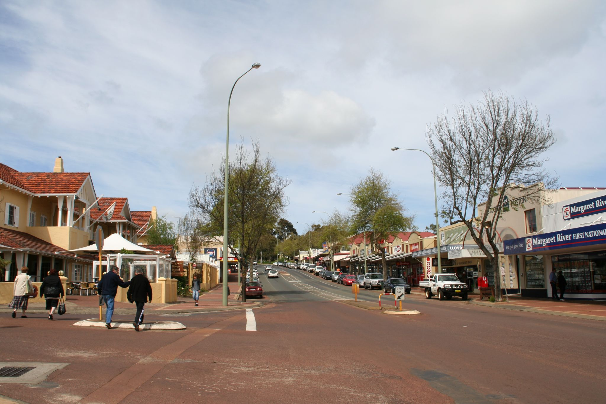 margaret river Australie-Occidentale